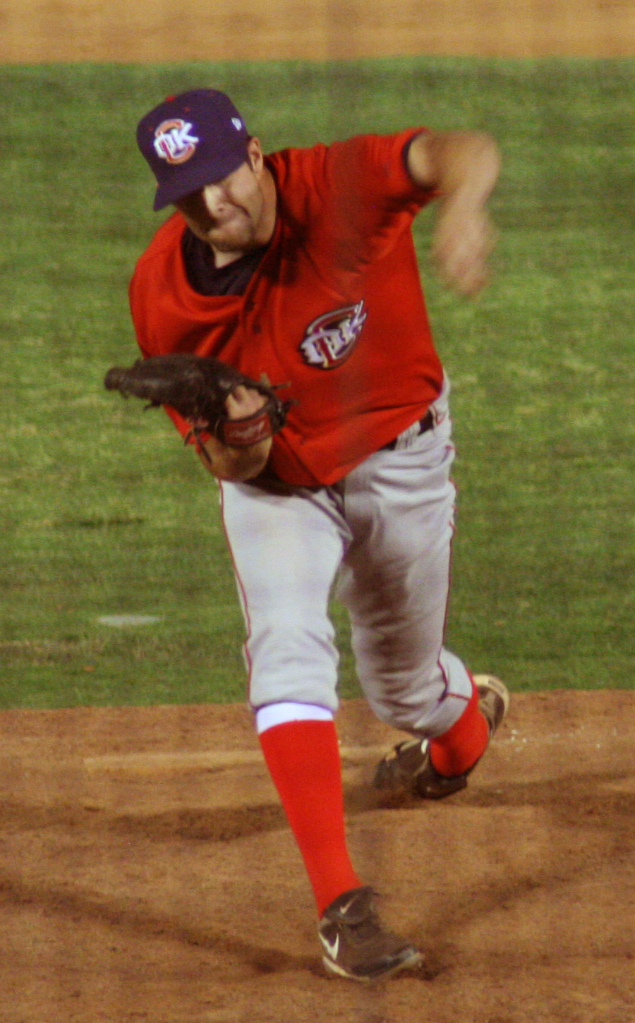 Mike Hinckley